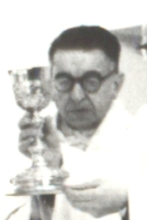 Mons. Josef Poul při mši v litoměřickém kněžském semináři (Komenského ul. č. 4)